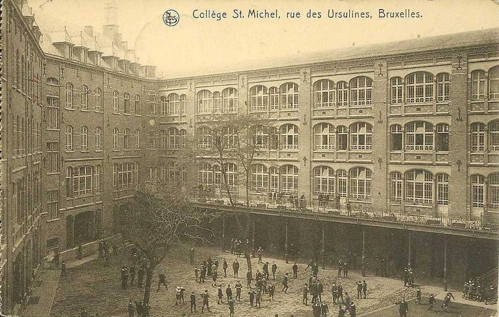 2ème Collège Saint Michel, site de la rue des Ursulines. Cour de récréation et élèves. Fin XIXème, début XXème siècle.